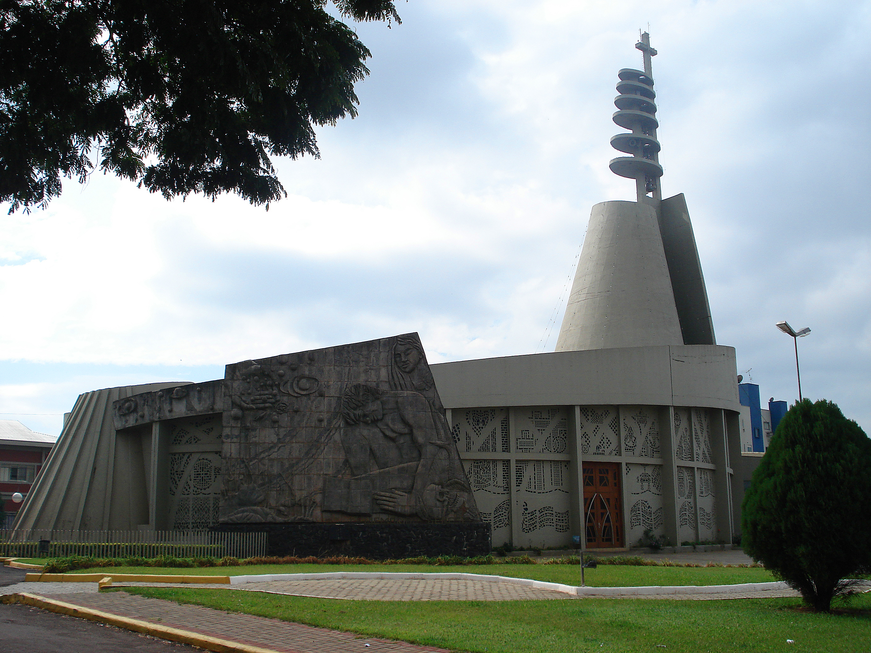 Catedral Cristo Rei - Toledo (Paraná).